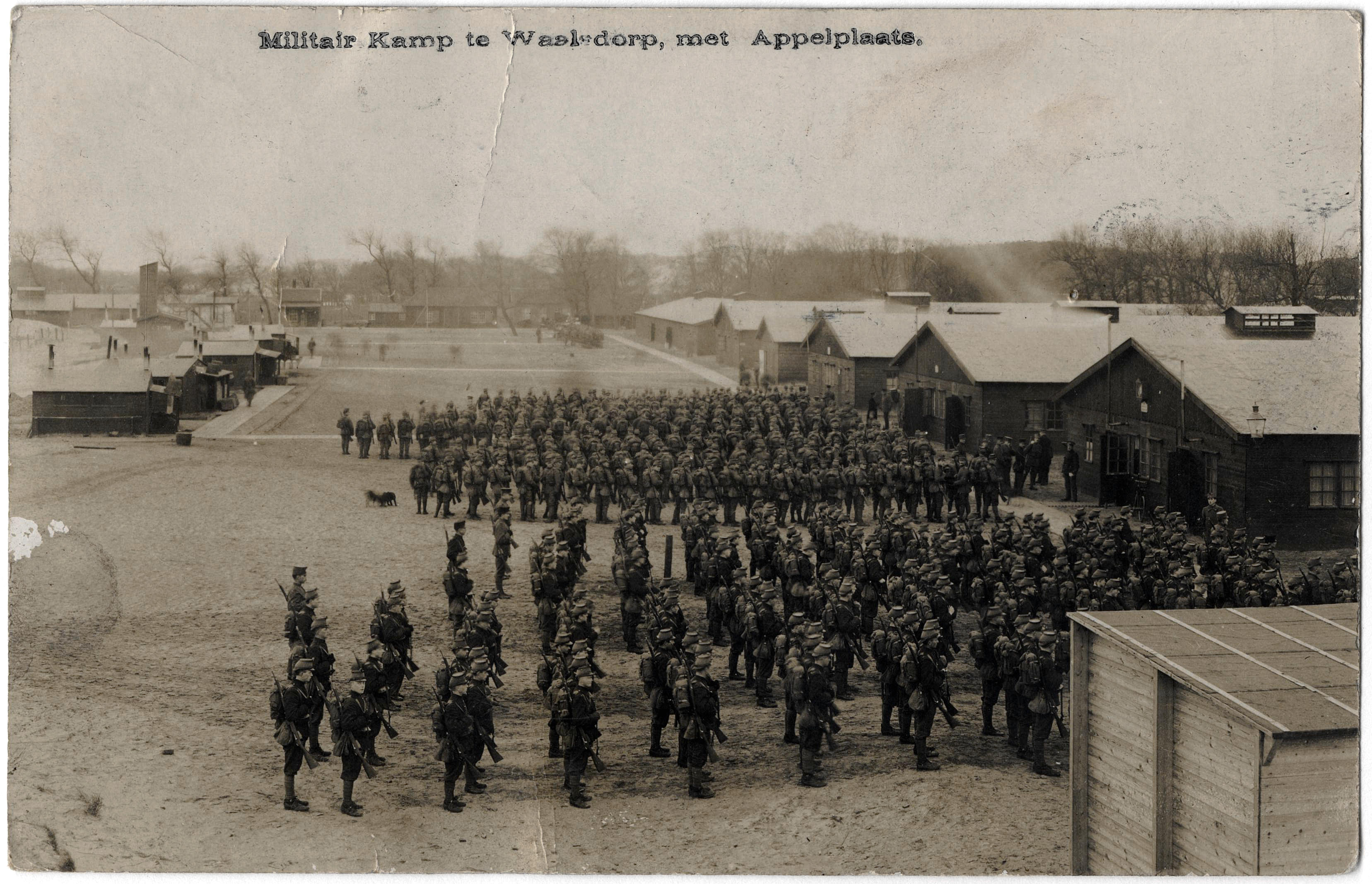 Legerkamp Waalsdorp, de Appèlplaats, ca. 1916